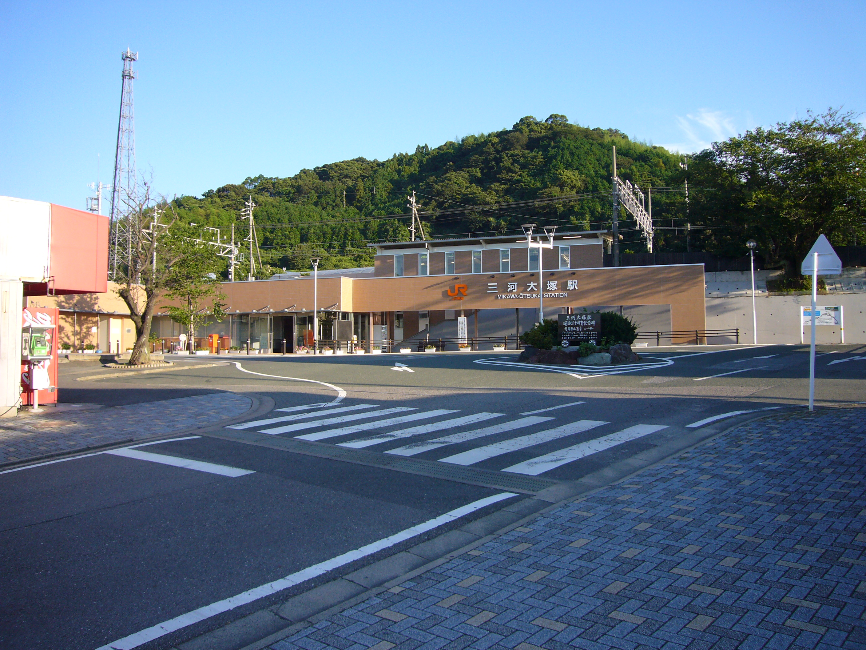 三河大塚駅